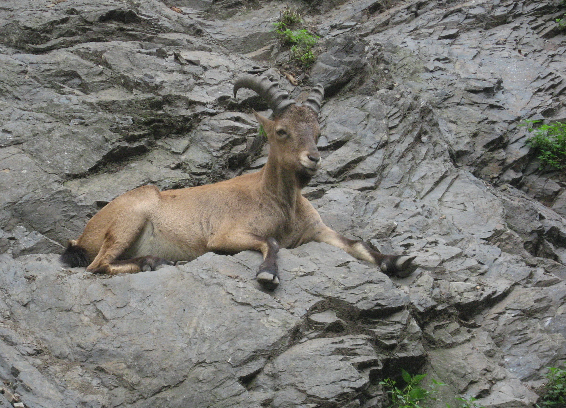 Kozorožec kavkazský